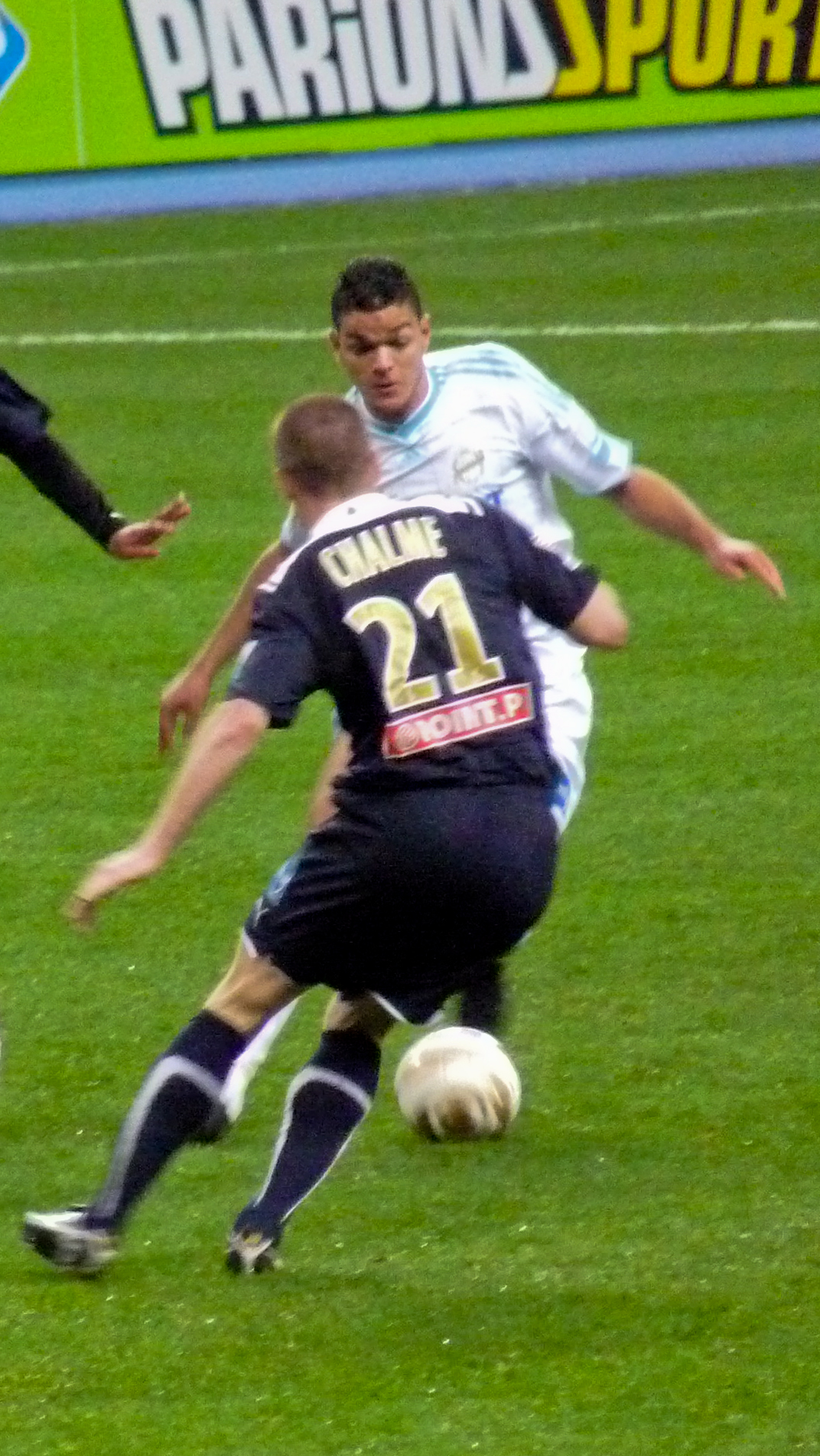 Finale de la coupe de la ligue - OM vs Bordeaux 3-1 - Stade de France - 27 mars 2010